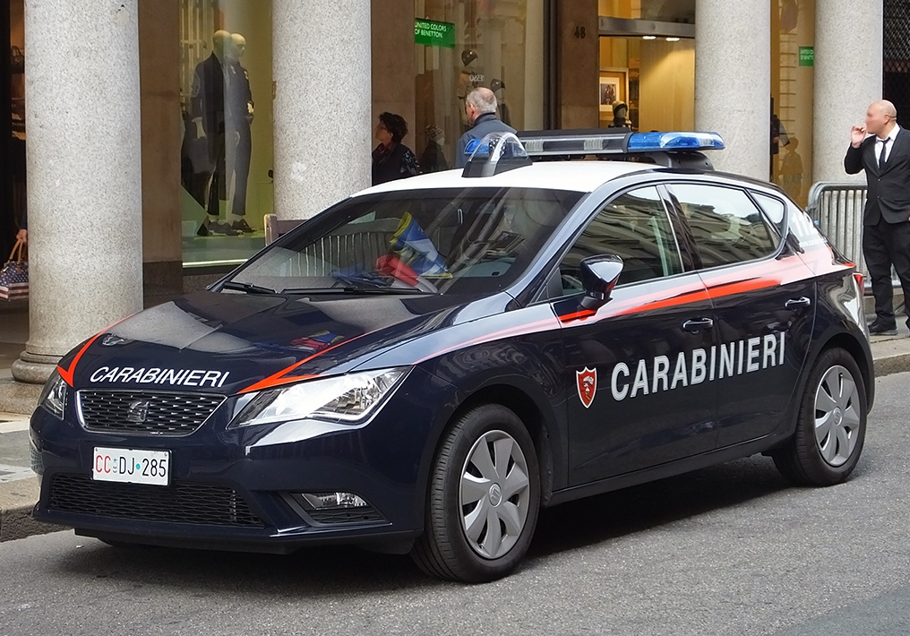 Seat Leone III serie appartenente al N.O.R.M di Torino